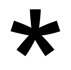 Asteriscus (Quadratnotation, Gregorianischer Choral)